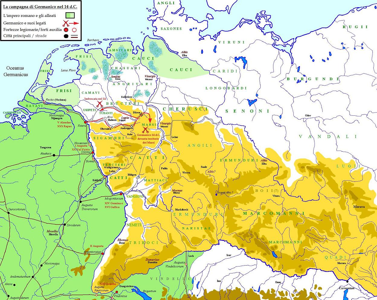 La campagna di Germanico nel 14 d.C.